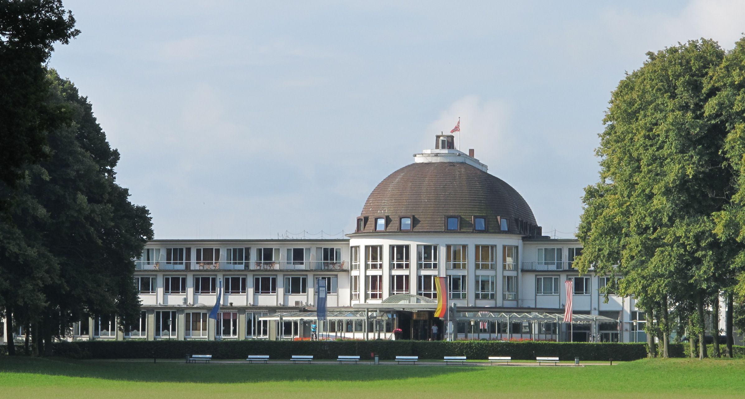 Parkhaus, Parkhotel in Bremen,Das abgebildete Objekt ist ein geschütztes Kulturdenkmal in der Freien Hansestadt Bremen, mit der Nr. 0218,T001 beim Landesamt für Denkmalpflege registriert.